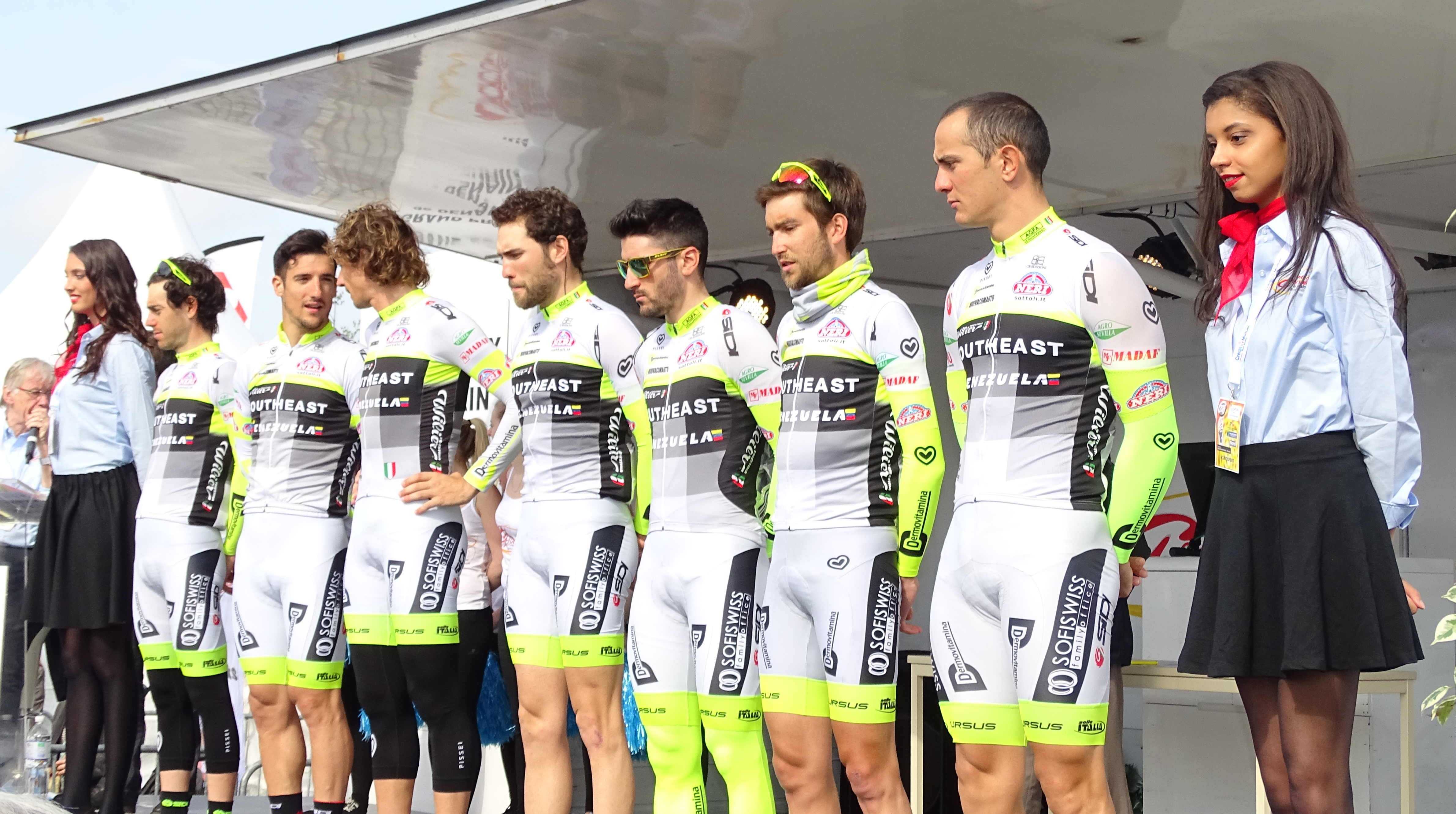 Reportage réalisé le jeudi 14 avril à l'occasion du départ et de l'arrivée du Grand Prix de Denain 2016 à Denain, Nord, Nord-Pas-de-Calais-Picardie, France.